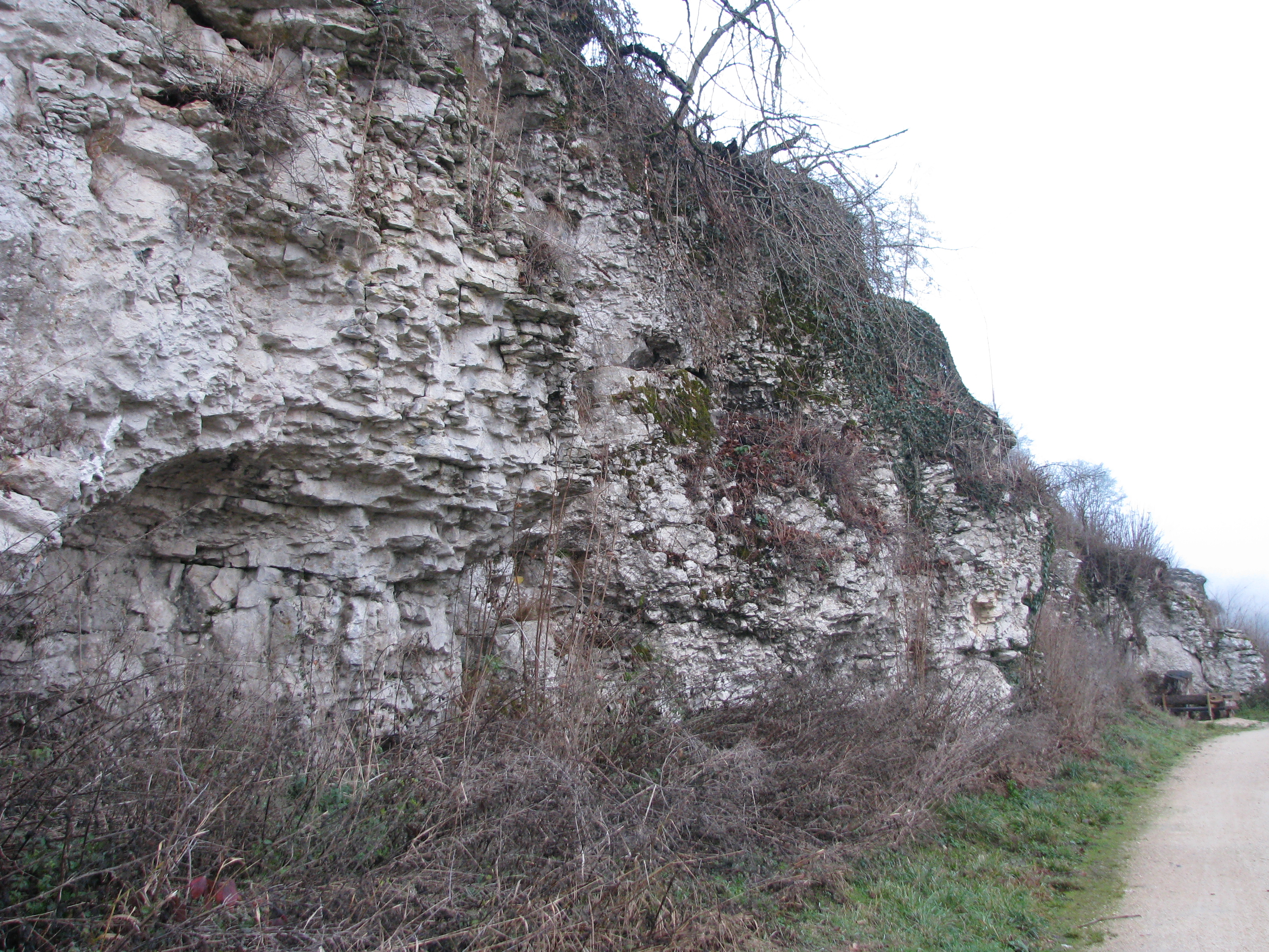 Felsprojekt Jura bei der Attenbrunner Mühle im Altmühltal, Felspartie